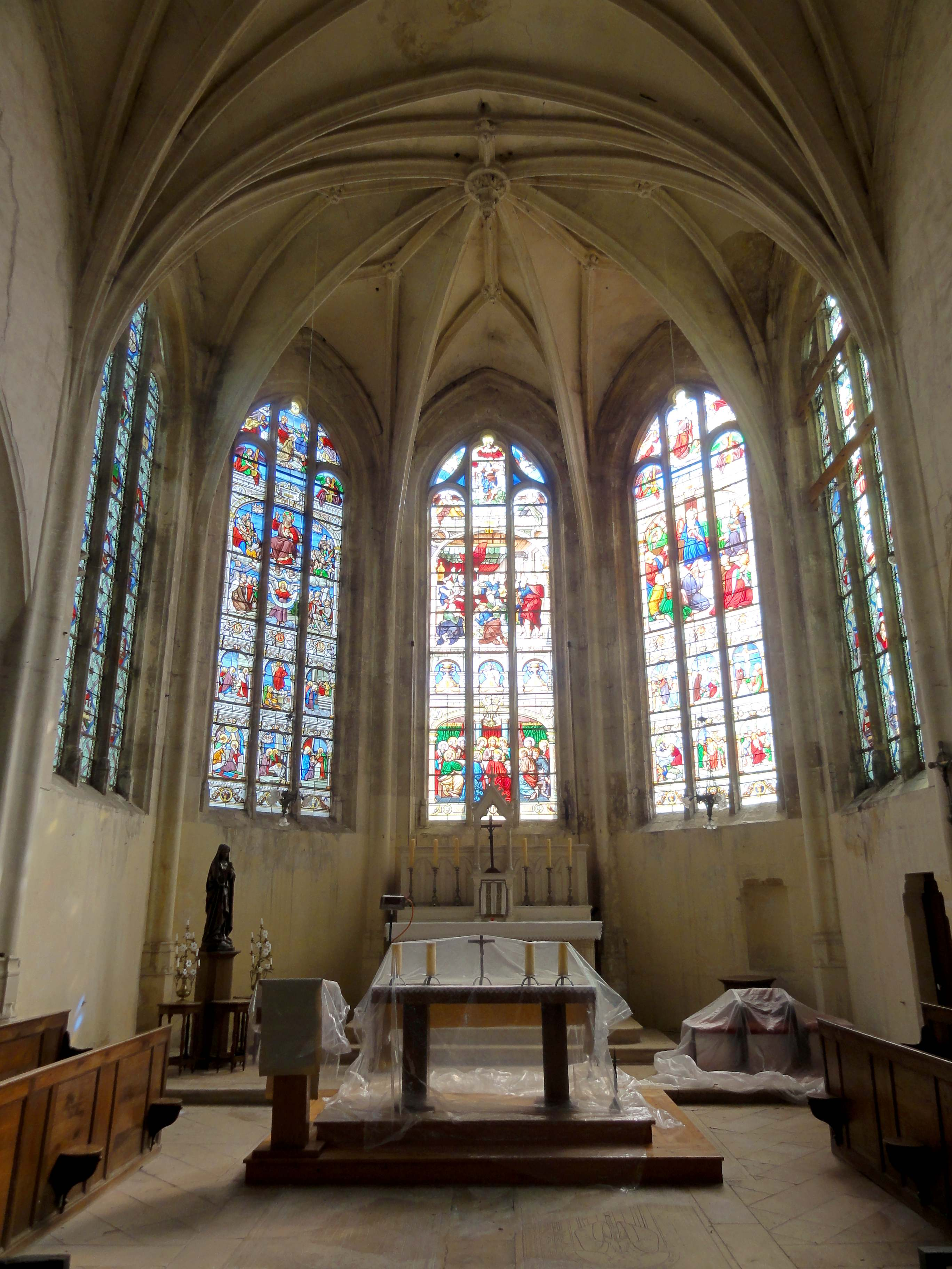 Intérieur de l'église (voir titre).